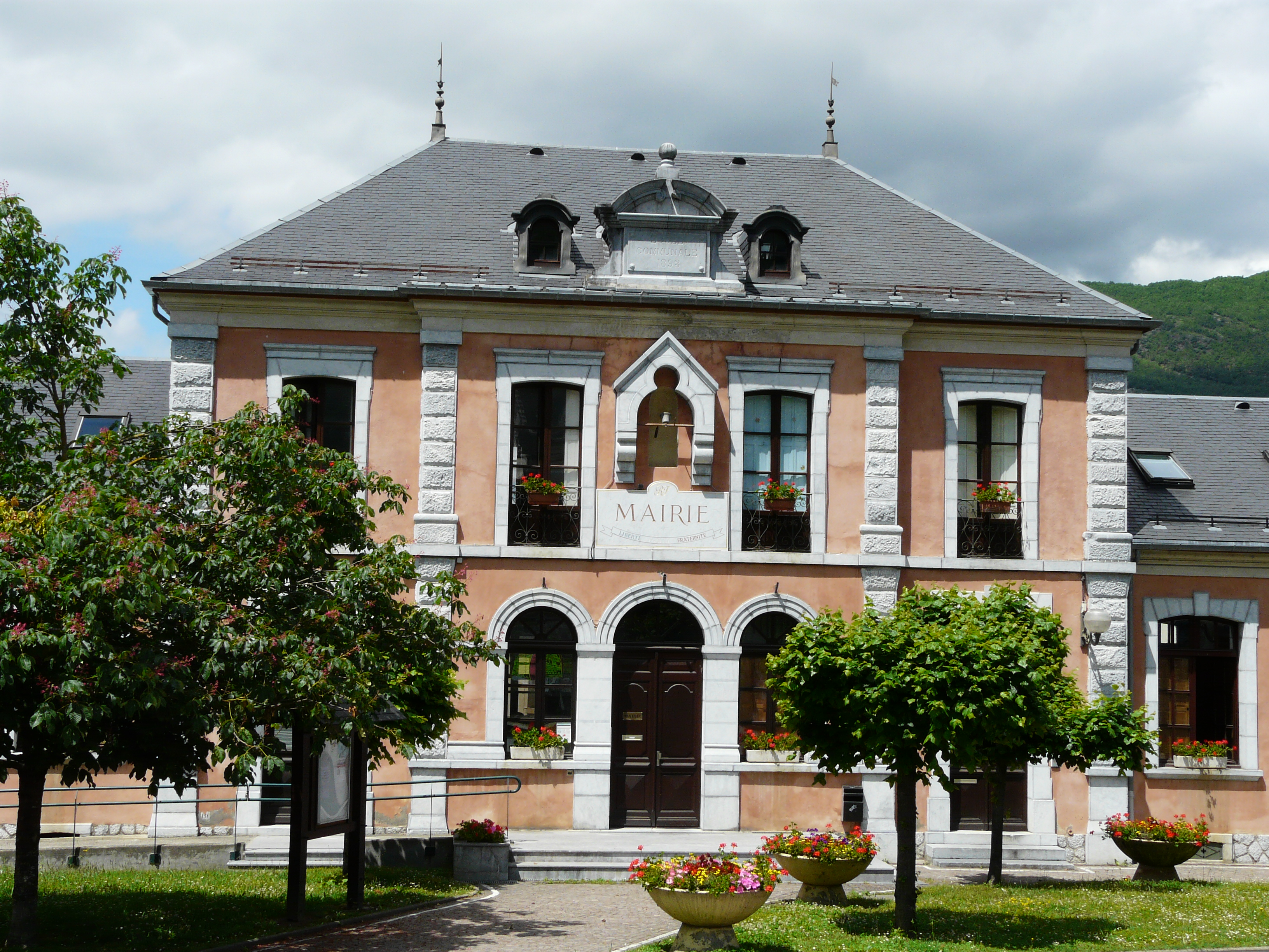 La mairie de Marignac, Haute-Garonne, France.